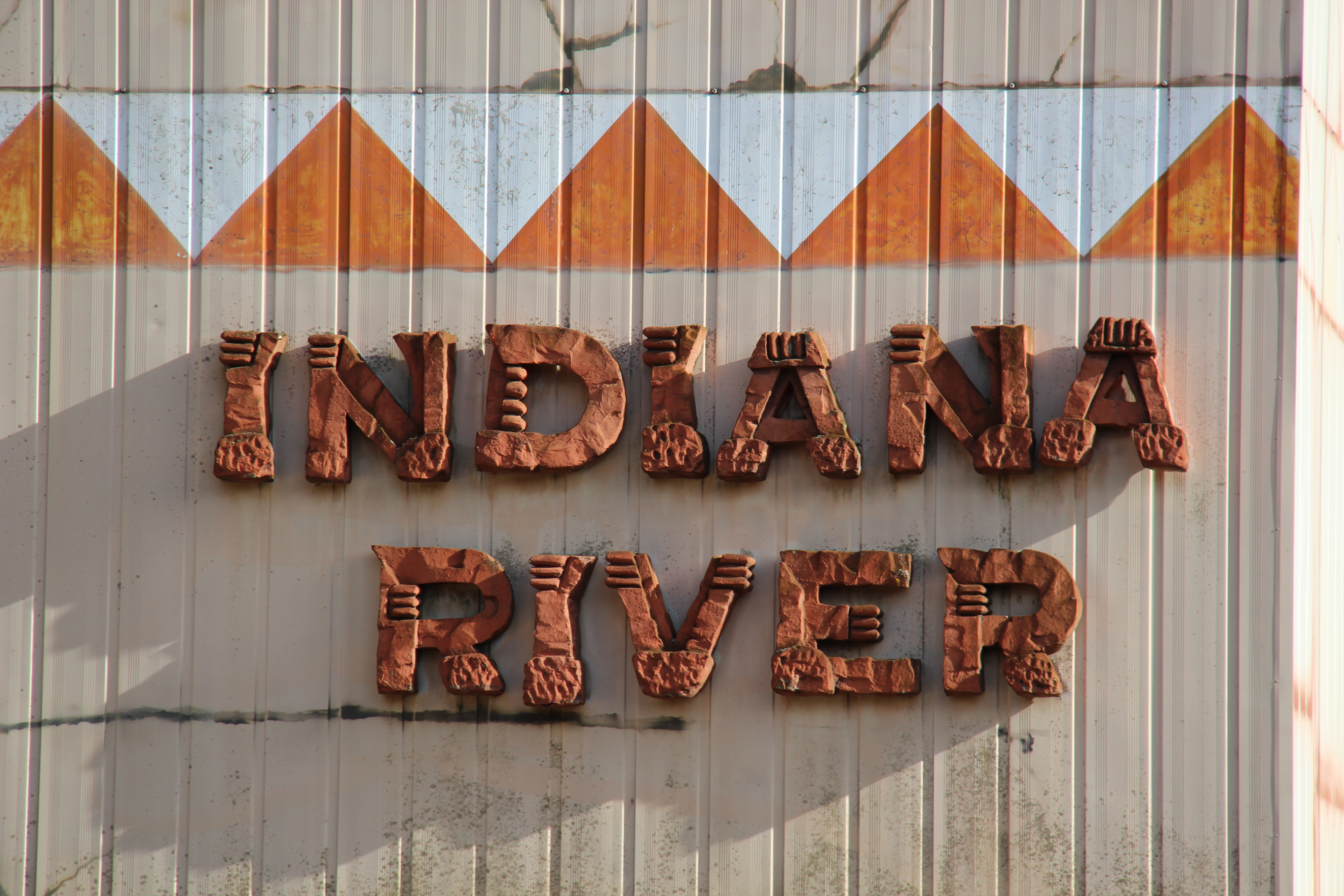 Indiana River op de muur van de attractie